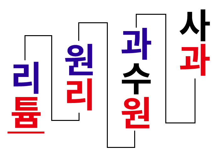 끝말잇기